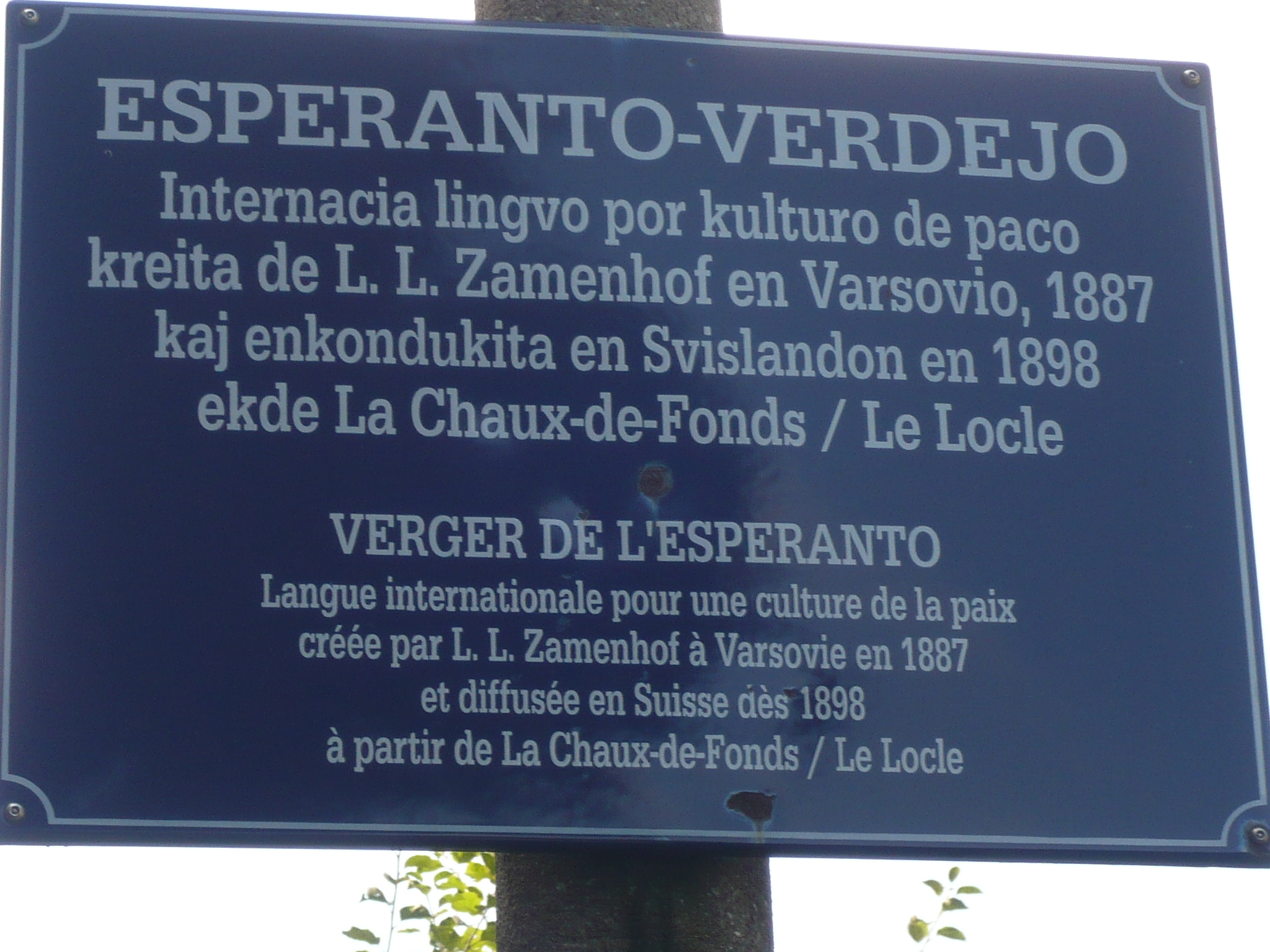 verger situé au croisement de la Rue du Succès et de la Rue des Recrêtes à La Chaux-de-Fonds